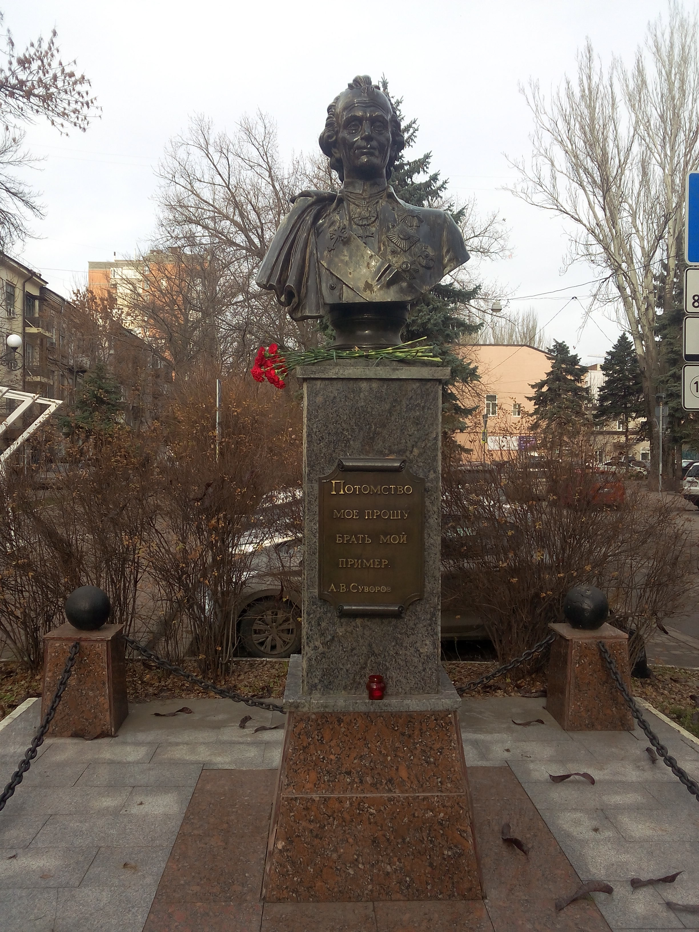 г. Ростов-на-Дону, памятник А.В. Суворову (пер. Университетский)